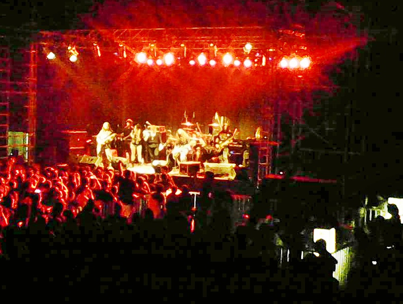 Muireadach. Heavy metal paraguayo. Septiembre de 2014.